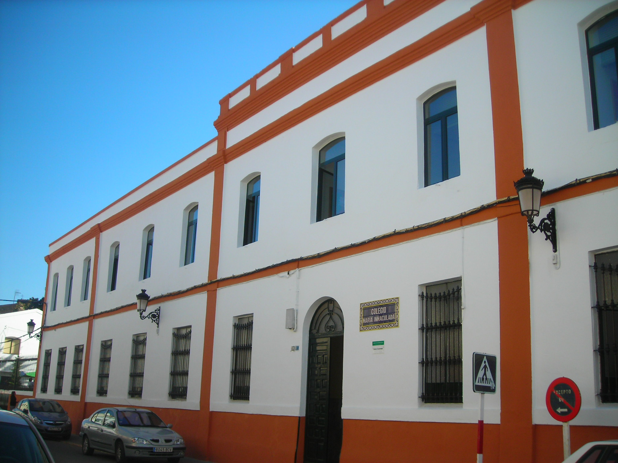 Fachada del colegio claretiano de Zafra, Badajoz